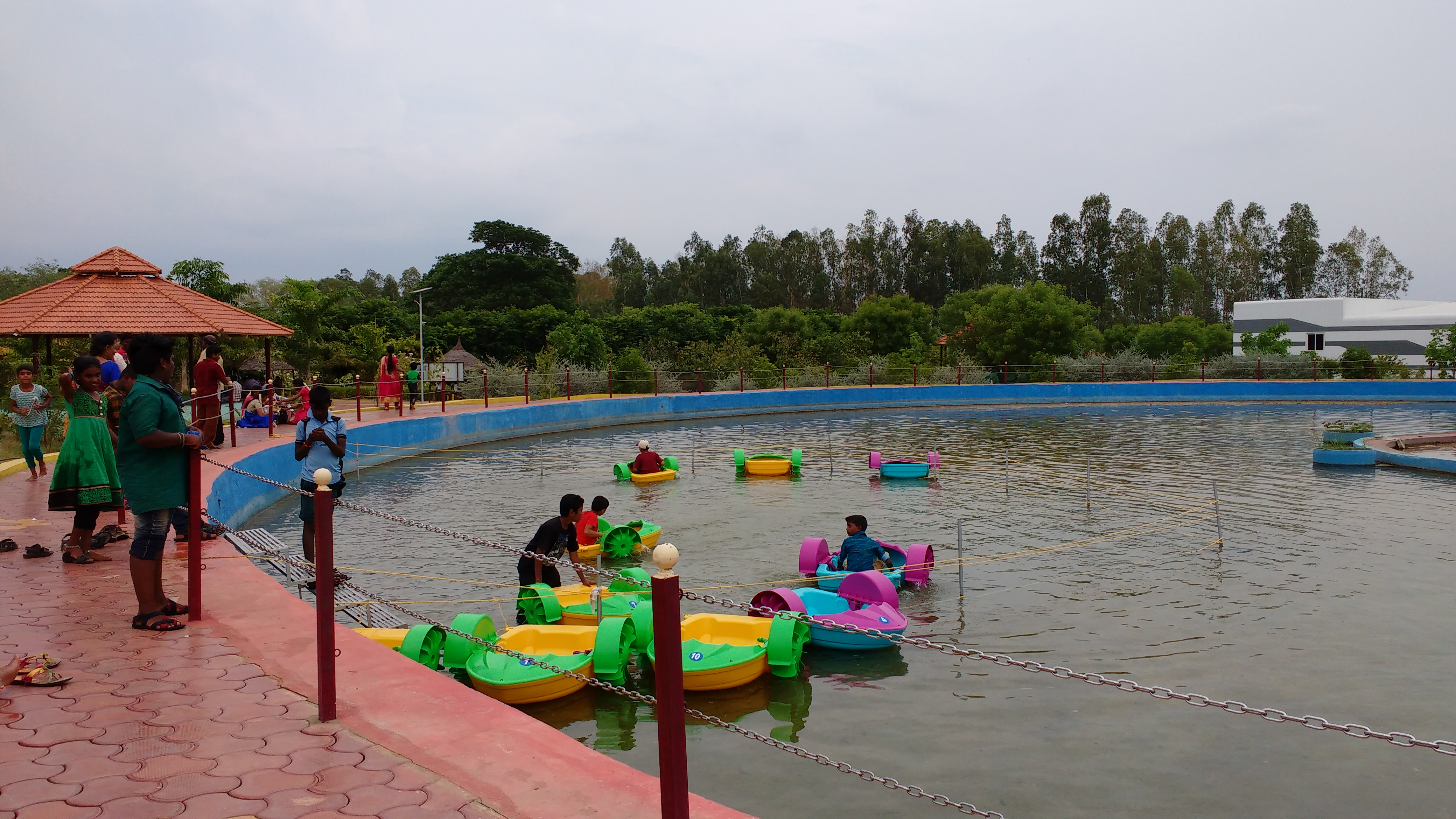 ஸ்ரீரங்கம் வண்ணத்துப்பூச்சி பூங்காவிலுள்ள சிறுவர்கள் படகுக்குளம்